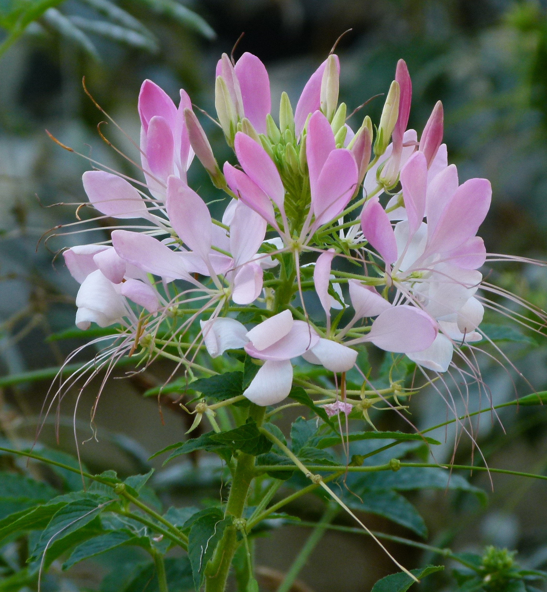 Cleome spinosa "Helene Cambel"